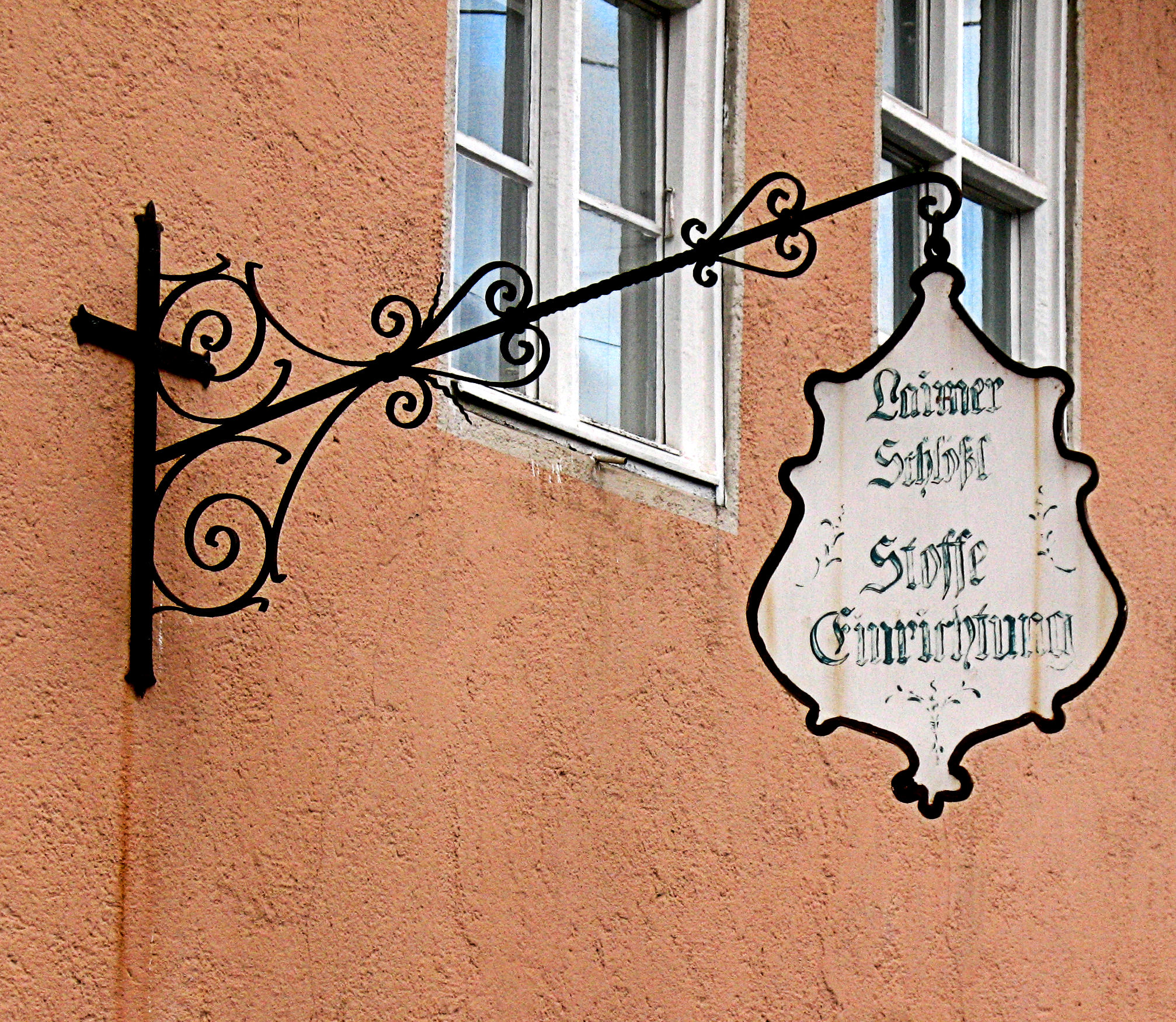 Germany, Bavaria, Munich, Hausschild des "Laimer Schlössl"